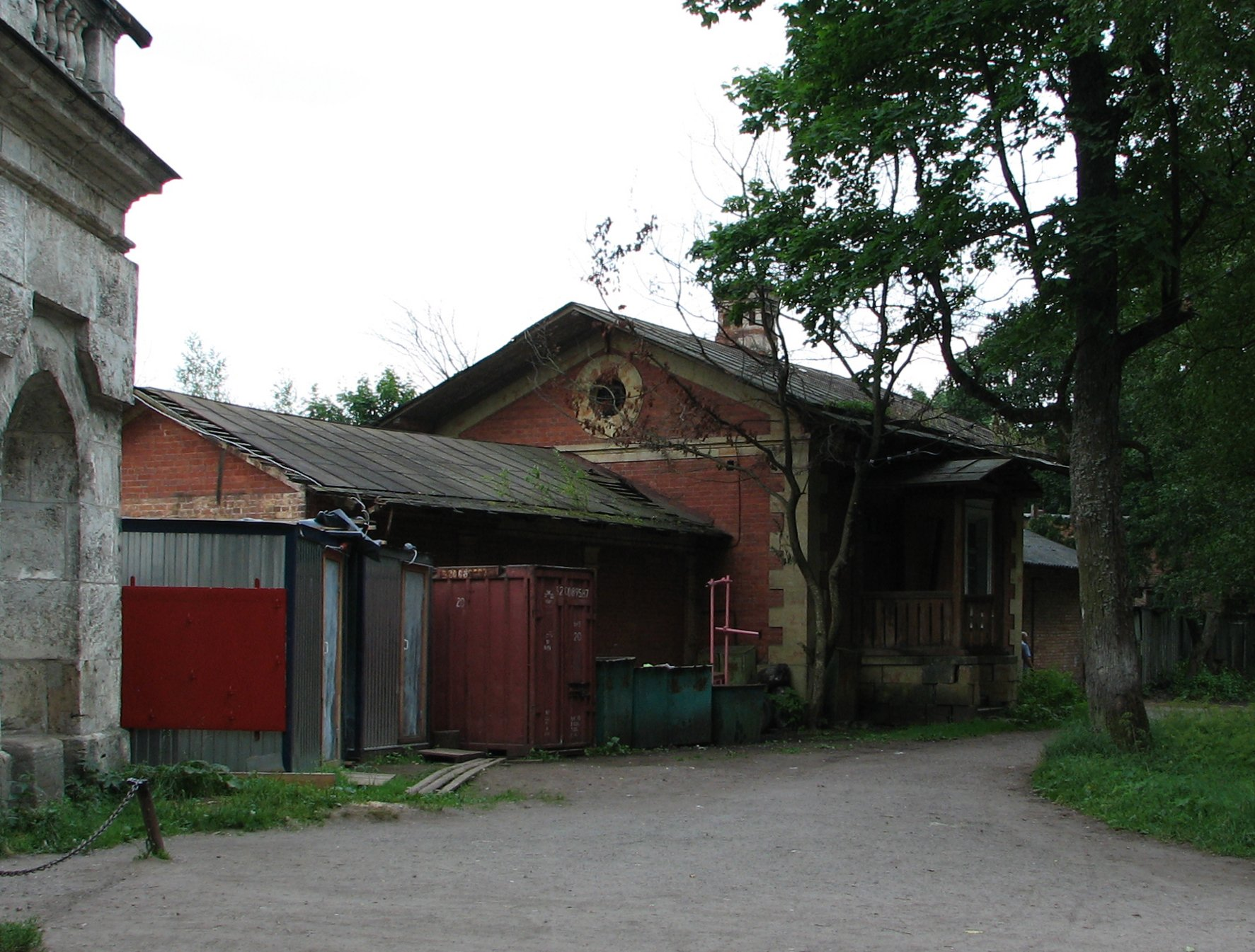 Караулка около Берёзовых ворот в Дворцовом парке (Гатчина)